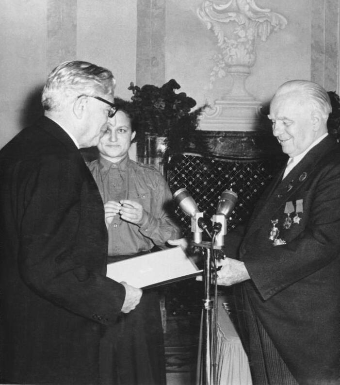 Vaterländischer Verdienstorden für Ernst Bloch Zentralbild / Sturm, 7.9.1955 Präsident Pieck verlieh Professor Dr. Ernst Bloch den Vaterländischen Verdienstorden in Silber. Präsident Wilhelm Pieck verlieh am 7.9.1955 in seinem Amtssitz in Berlin-Niederschönhausen Professor Dr. Ernst Bloch zu seinem 70. Geburtstag den Vaterländischen Verdienstorden in Silber. UBz: Präsident Pieck zeichnet Professor Ernst Bloch aus Abgebildete Personen: Pieck, Wilhelm: Präsident, Politbüro der SED, Vorsitzender der KPD, DDR Bloch, Ernst Prof. Dr.: Philosoph, Friedenspreis des Deutschen Buchhandels 1967, Bundesrepublik Deutschland (GND 118511742)